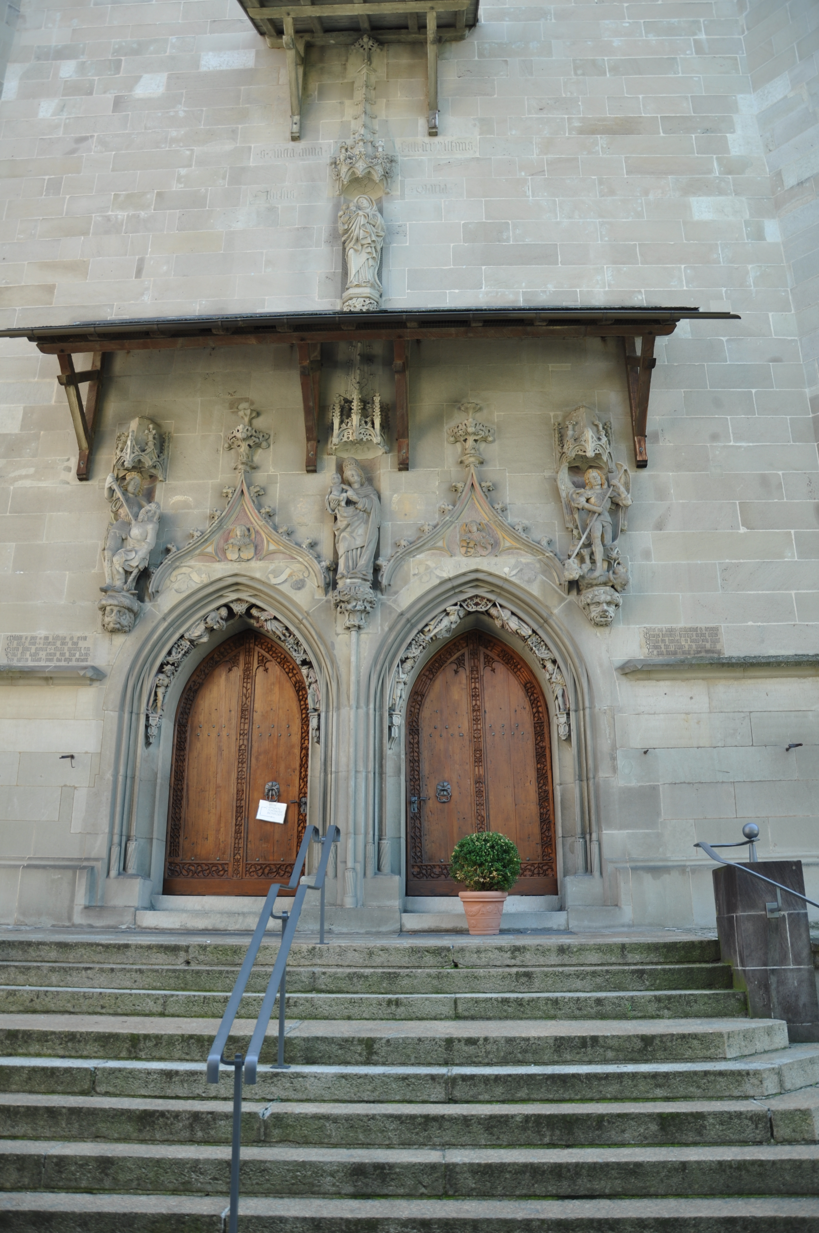 Zug Katholische Kirche St. Oswald